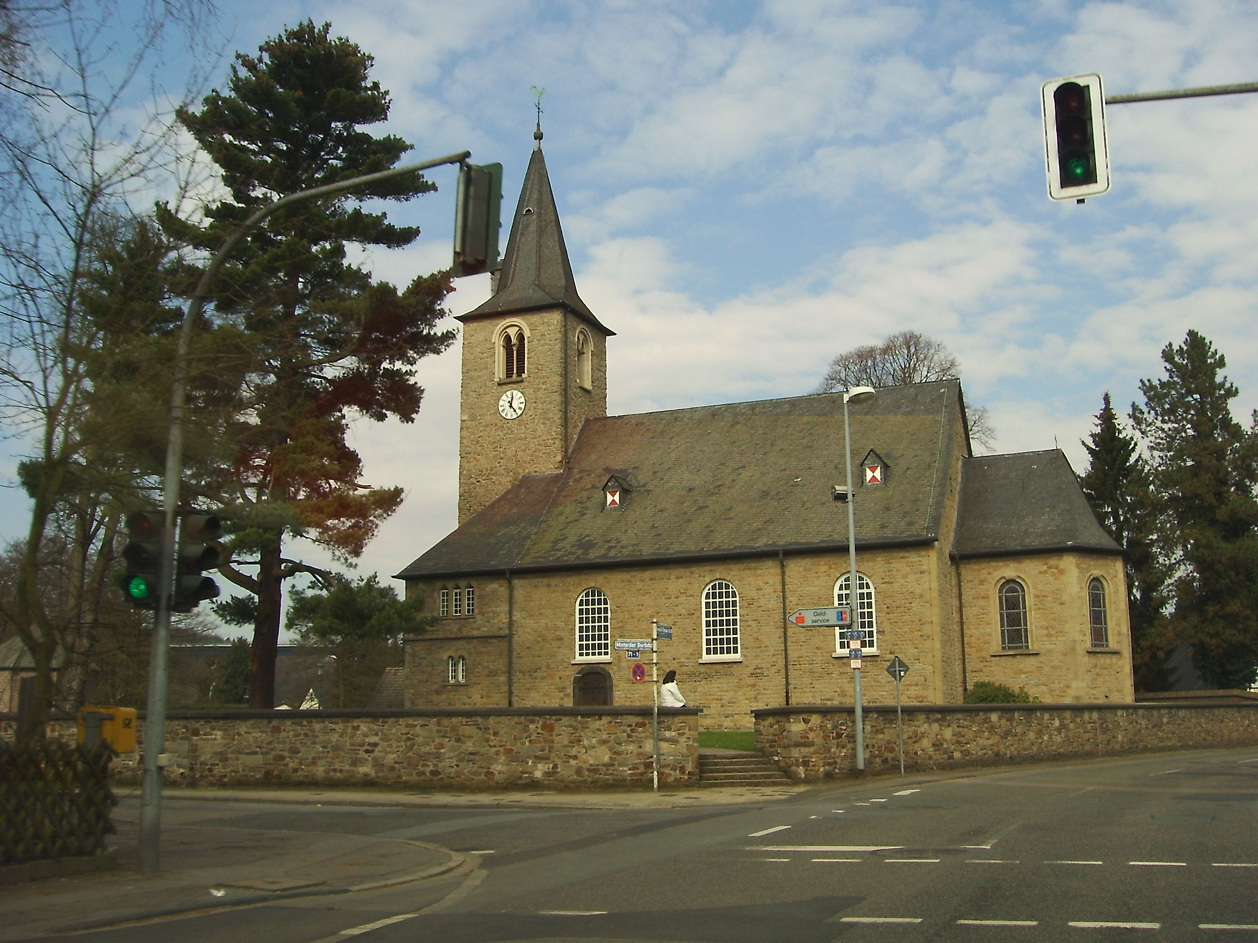 Church St. Laurentius, Mintard, Mülheim, Germany